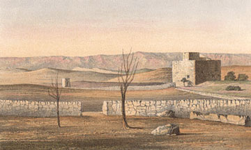 Near Jerusalesm